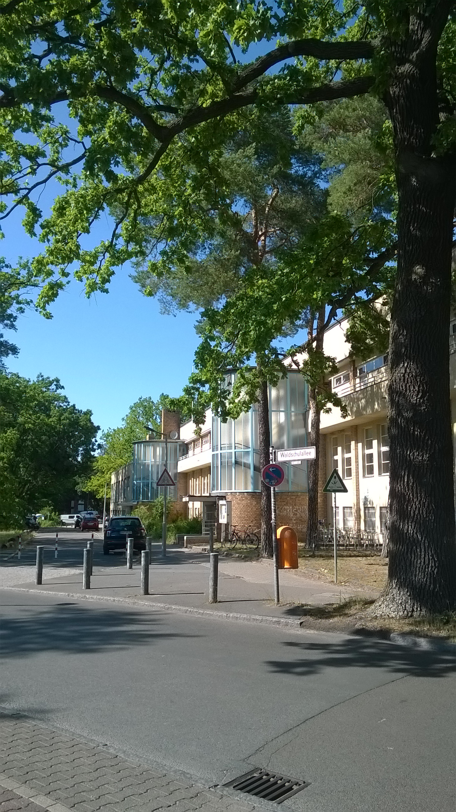 Mommsenstadion Berlin am 27.06.2019 (3)